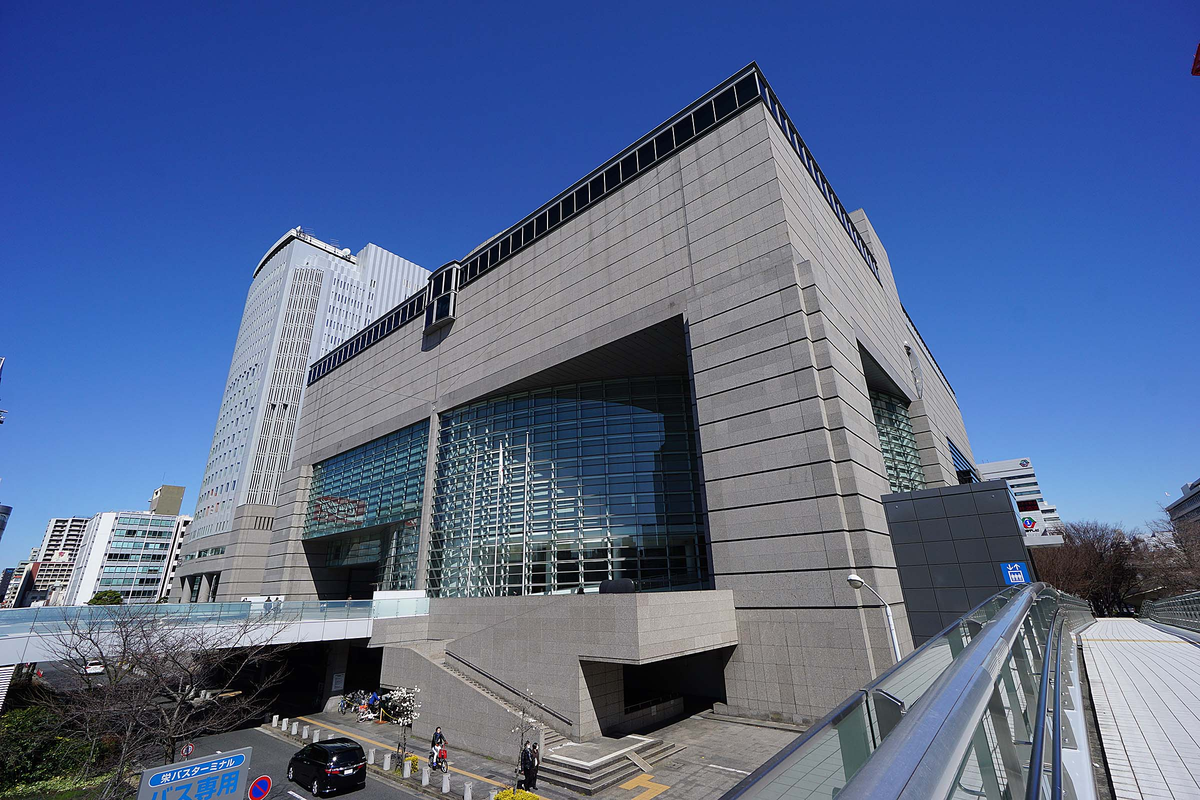 1 Chome Higashisakura, Higashi-ku, Nagoya-shi, Aichi-ken 461-0005, Japan